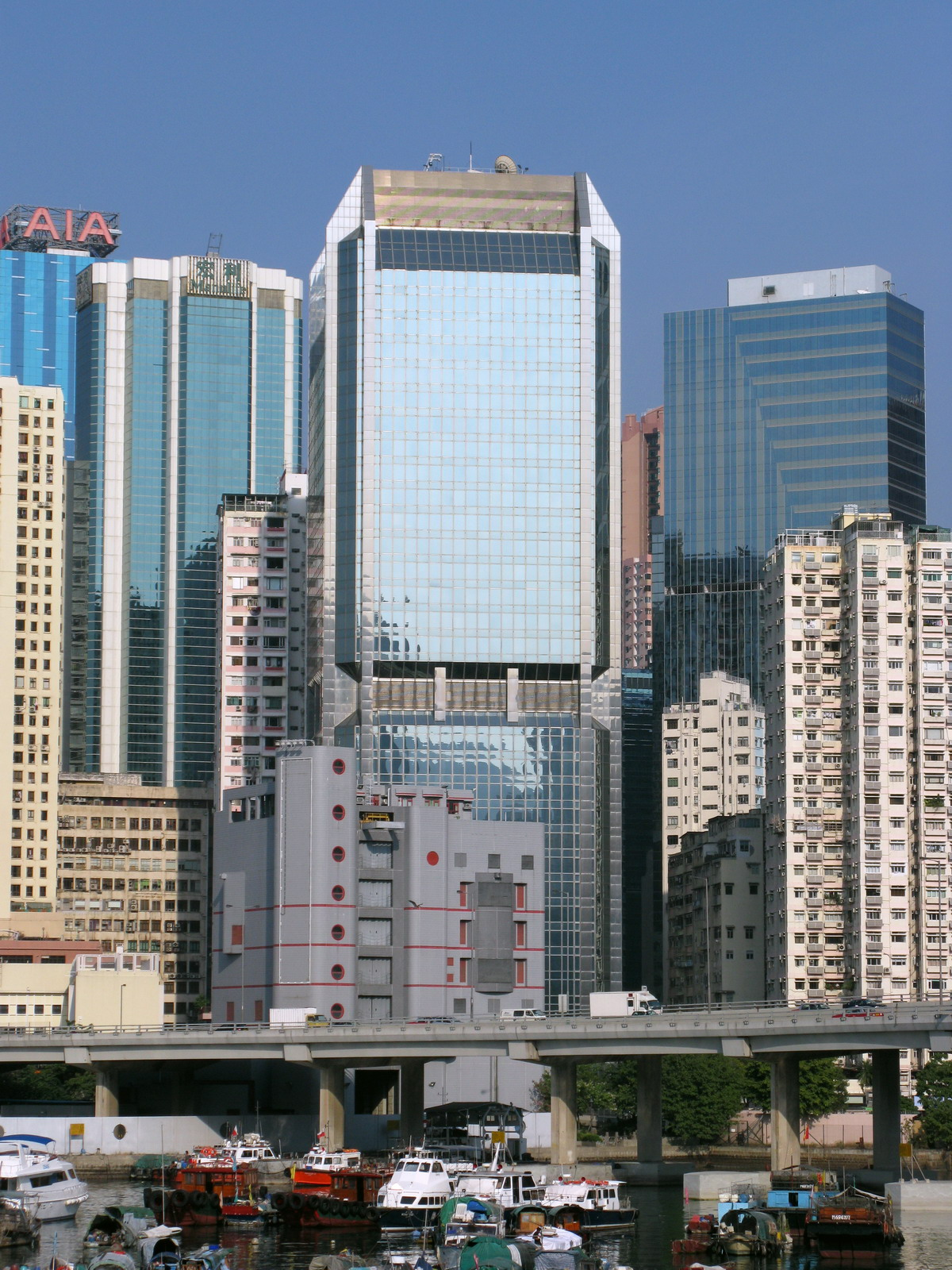 萬國寶通中心 Citicorp Centre